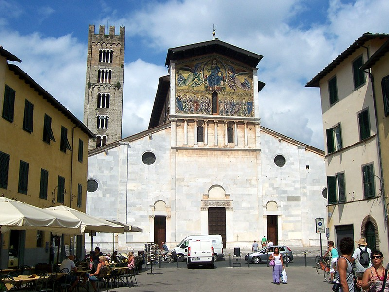 Lucca - Basilica di S. Frediano